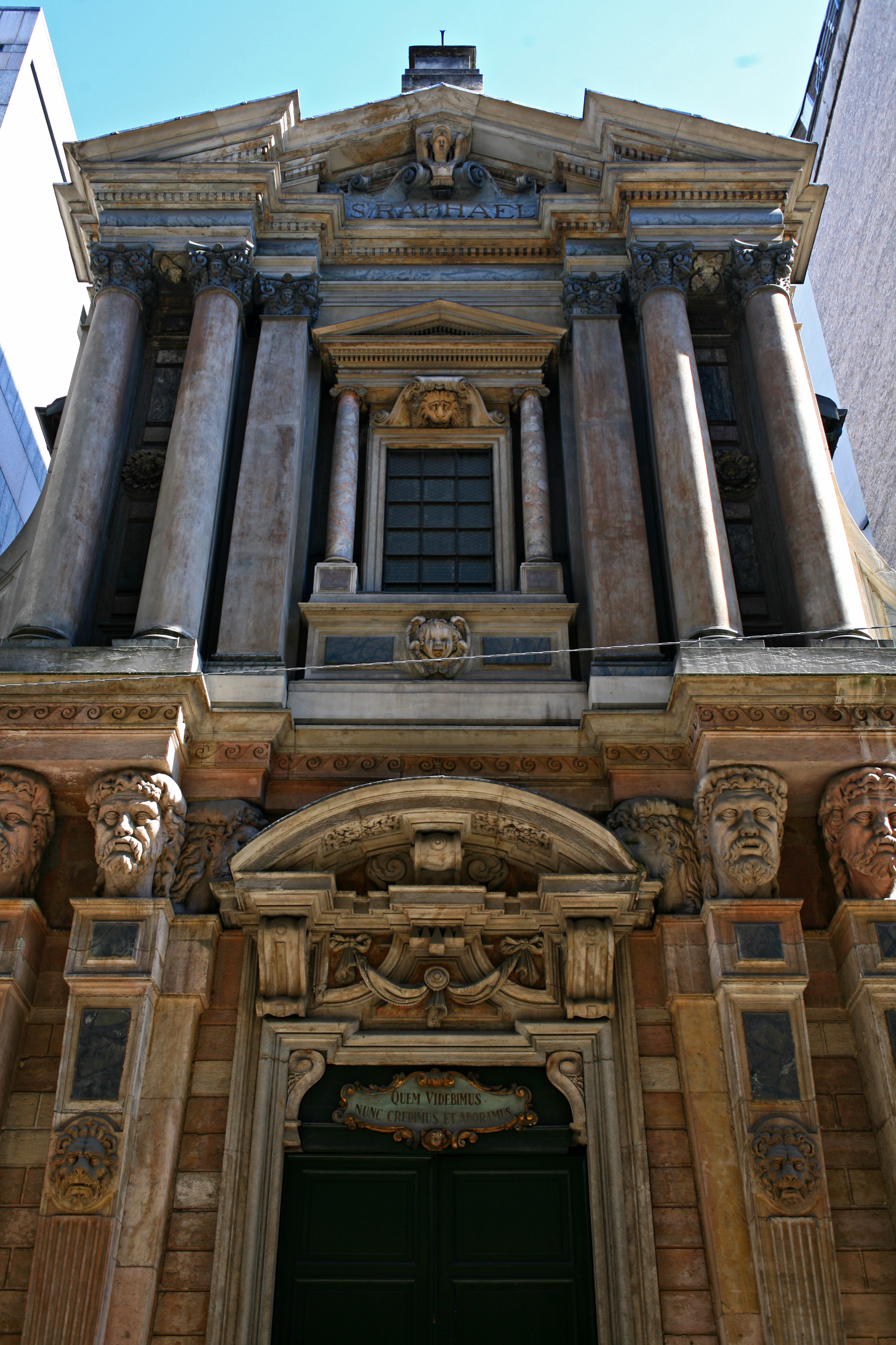 La chiesa di San Raffaele a Milano nella sua vista esterna